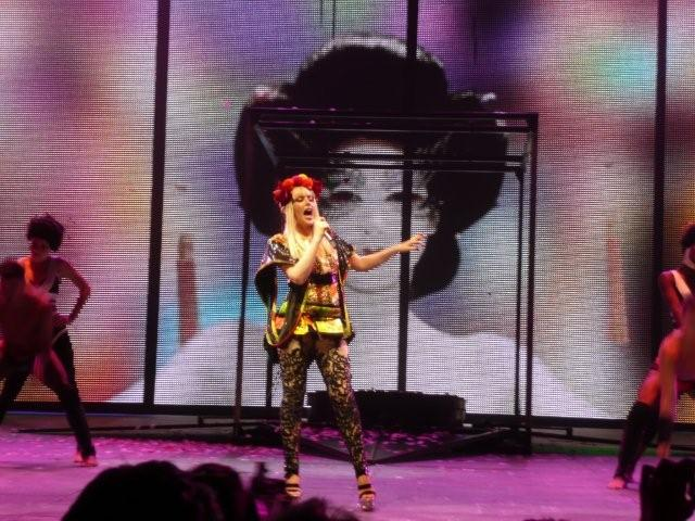 KylieX2008